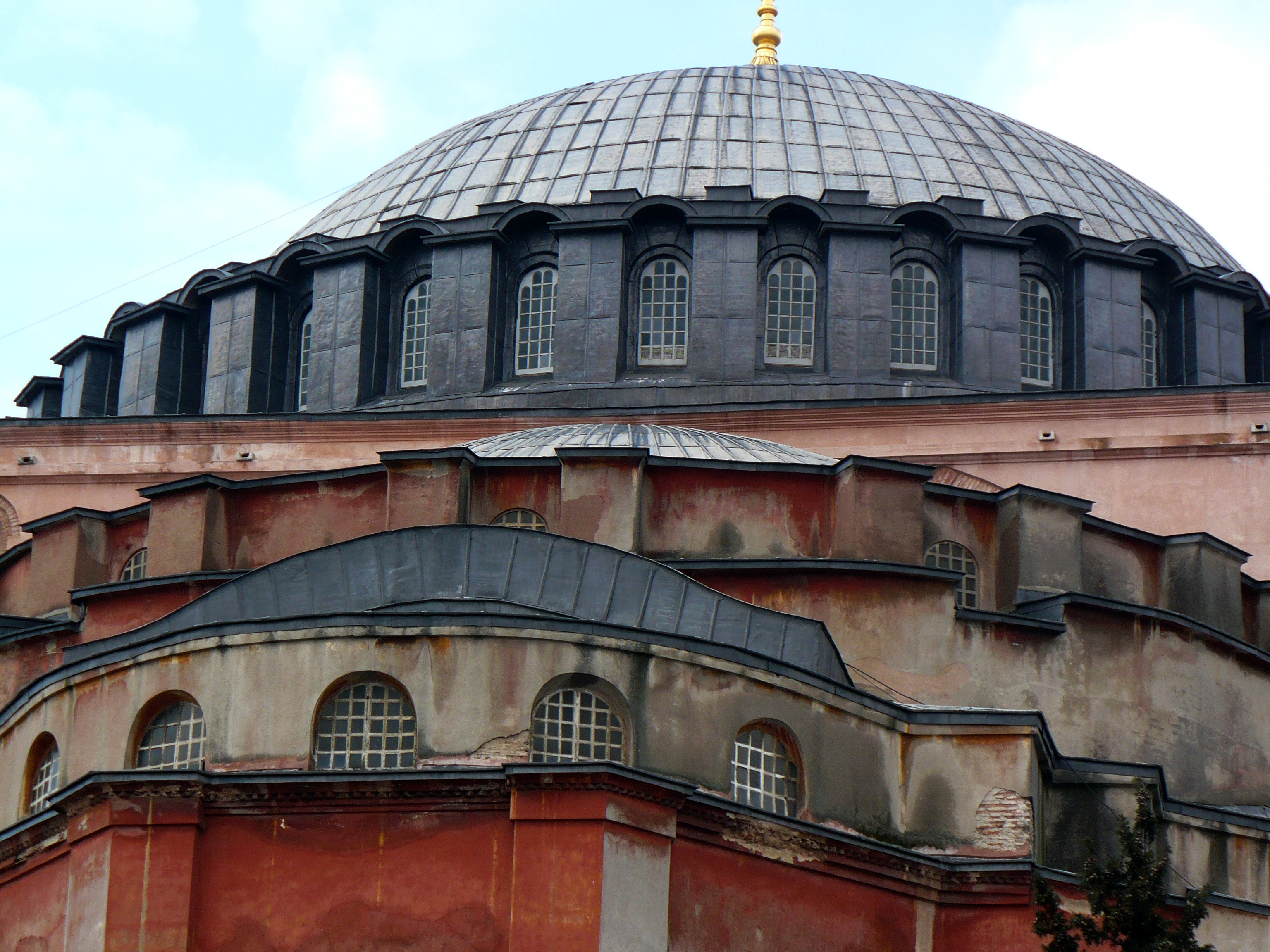 İstanbul'dan görüntüler